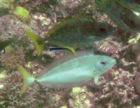 Naso minor, Romblon, Filipinas